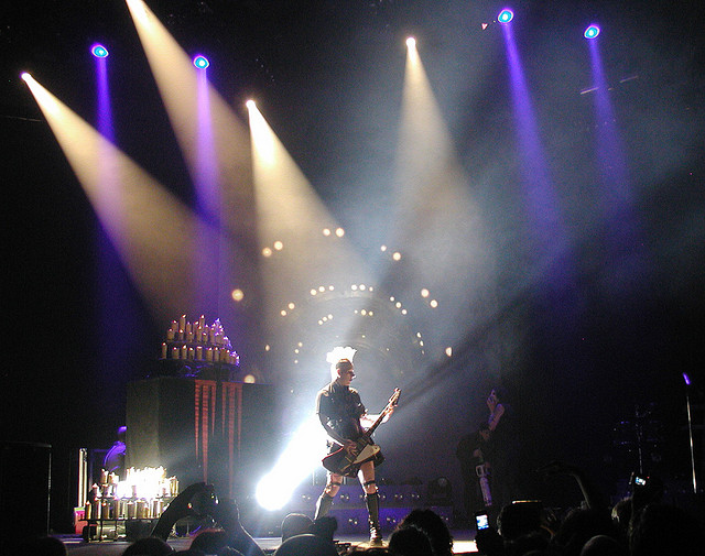 Tim Skold en vivo en la gira en promoción de Eat Me, Drink Me